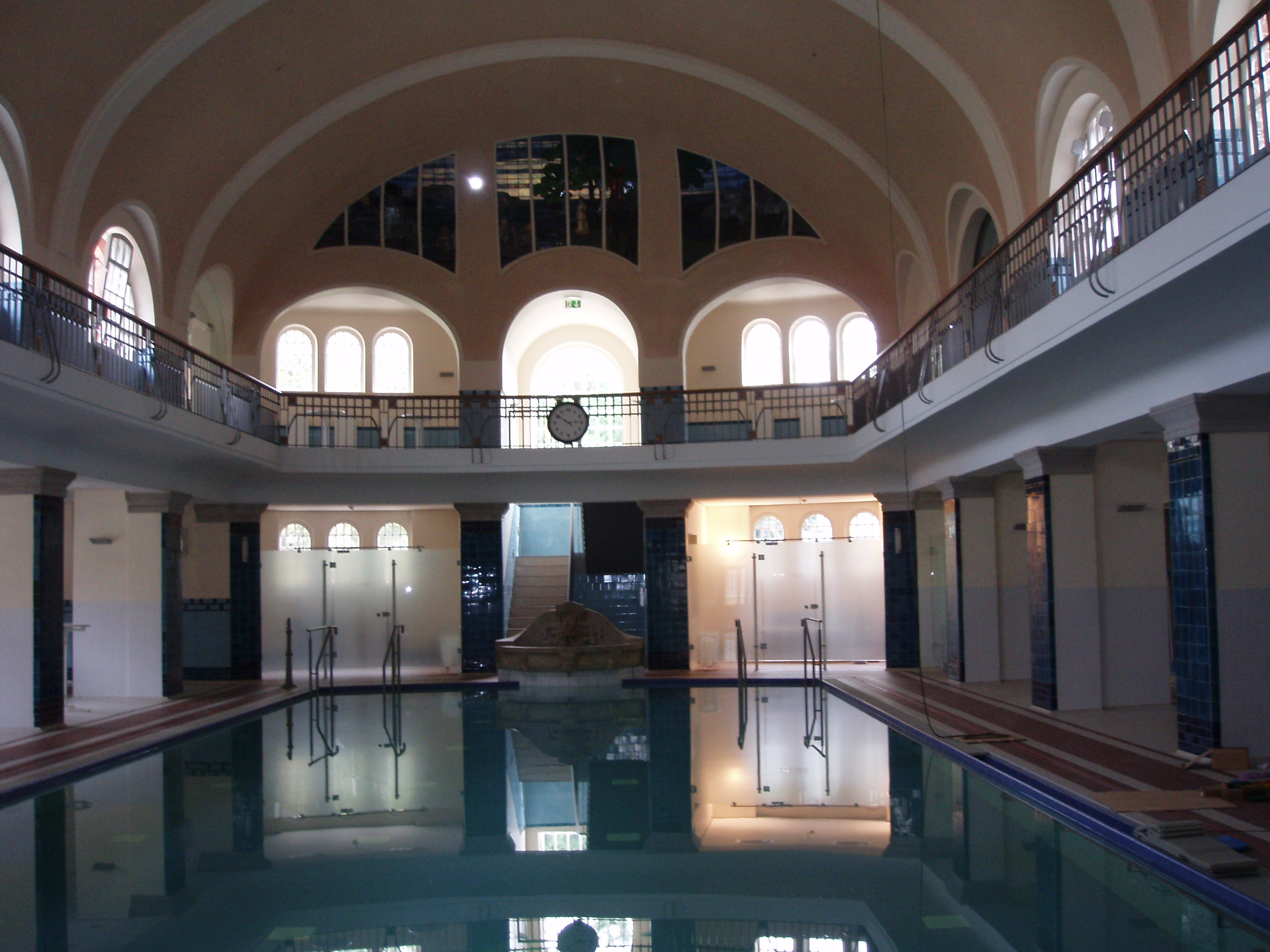 Merkelsches Schwimmbad